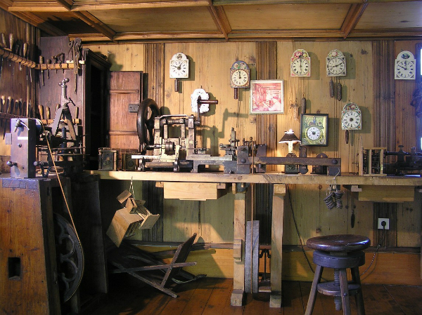 Uhrmacherwerkstatt, Heimatmuseum Schwenningen